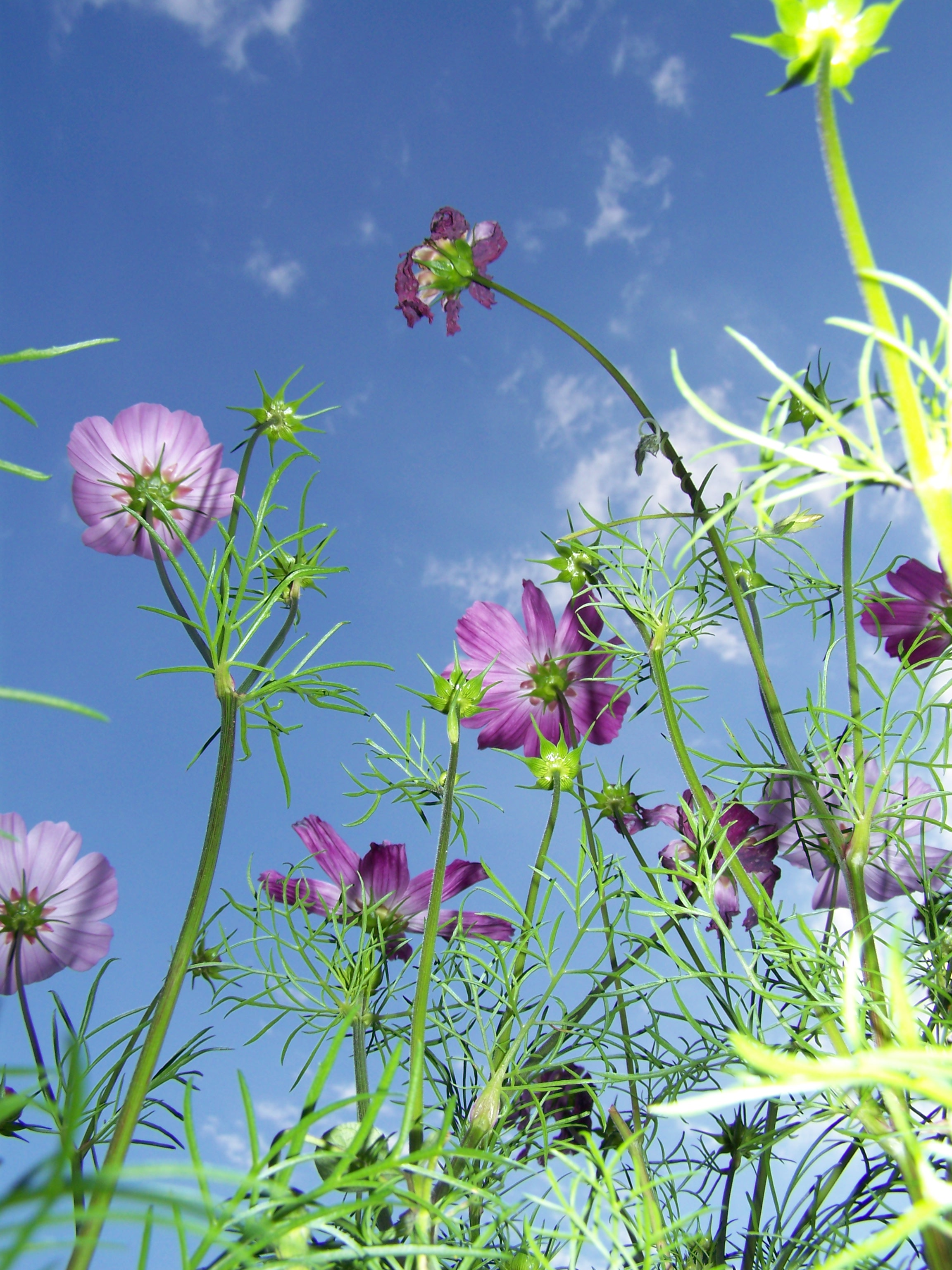 Cosmea